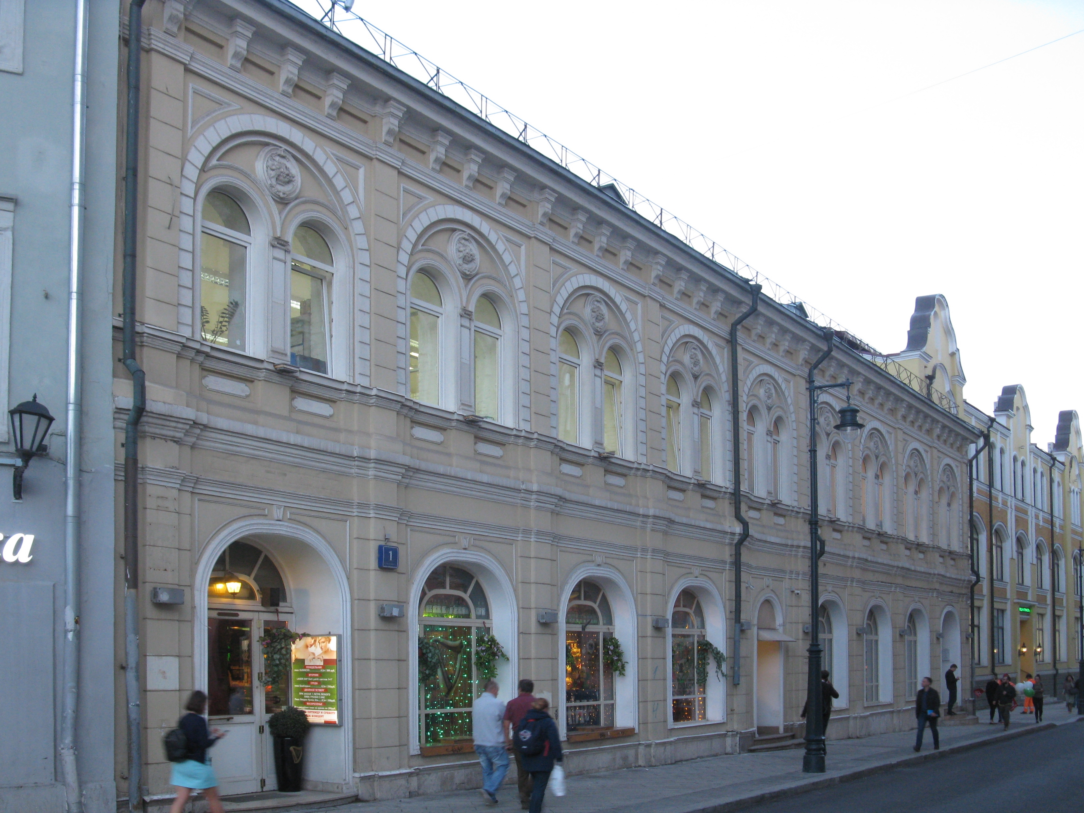 Доходное владение Товарищества Невской Ниточной Мануфактуры: Доходный дом К.Ф.Цыганова: Златоустинский Б. пер., дом 1, строение 1, Басманный, Центральный округ, Москва